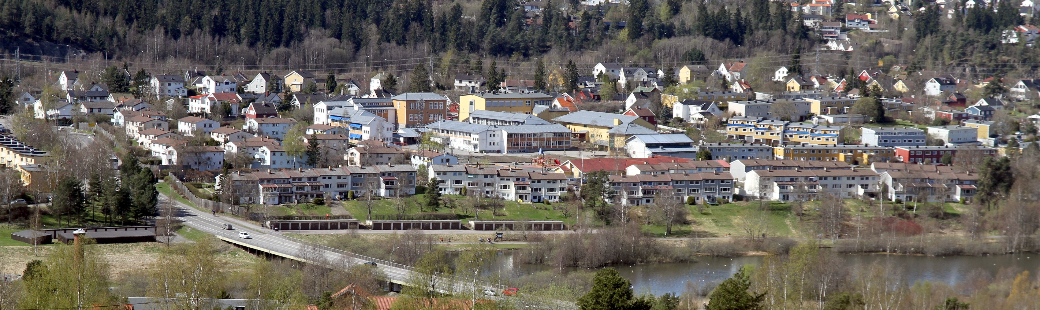 Abildsø i Oslo.